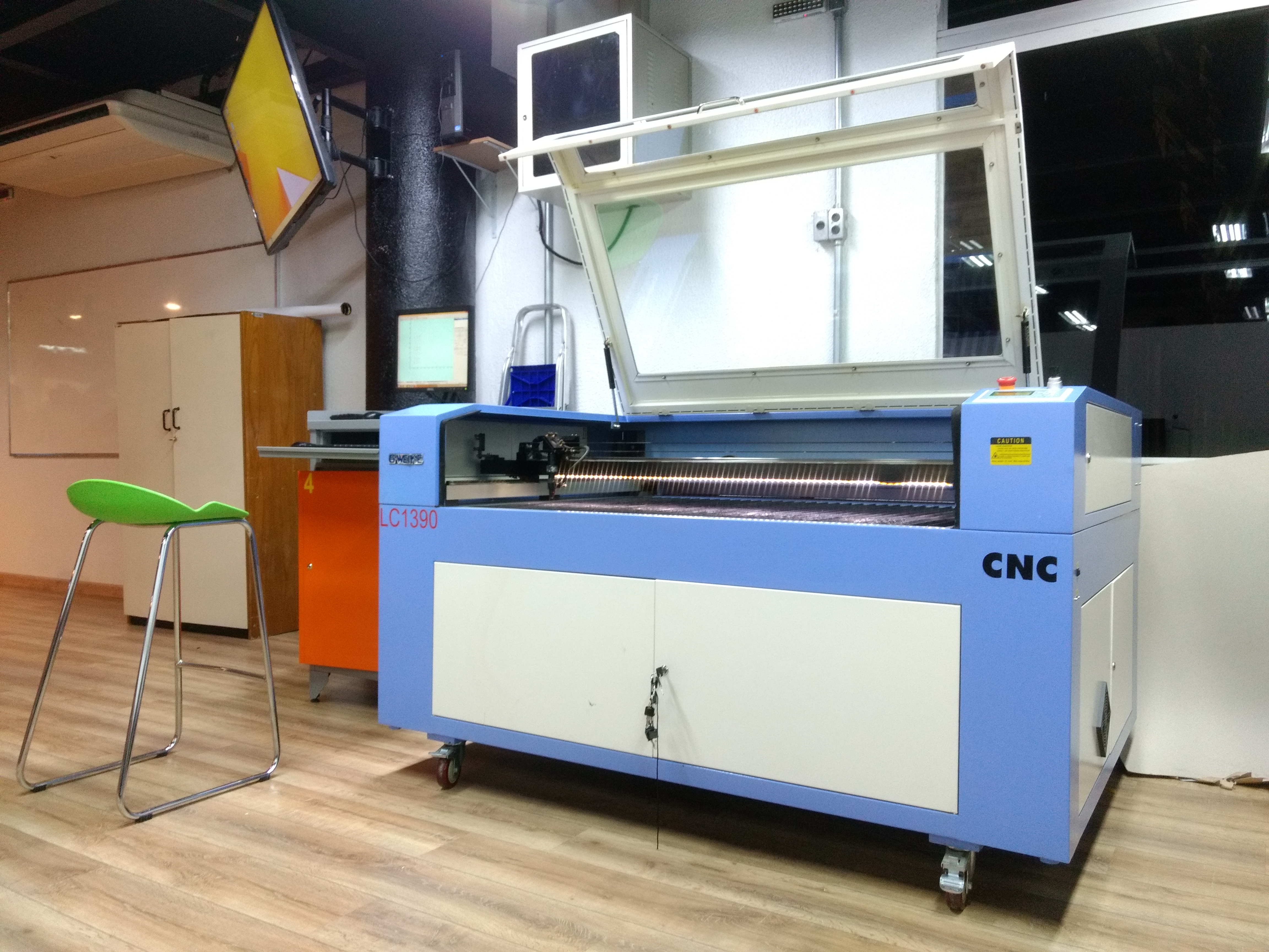 Cortadora Laser disponível no FabLAB Newton